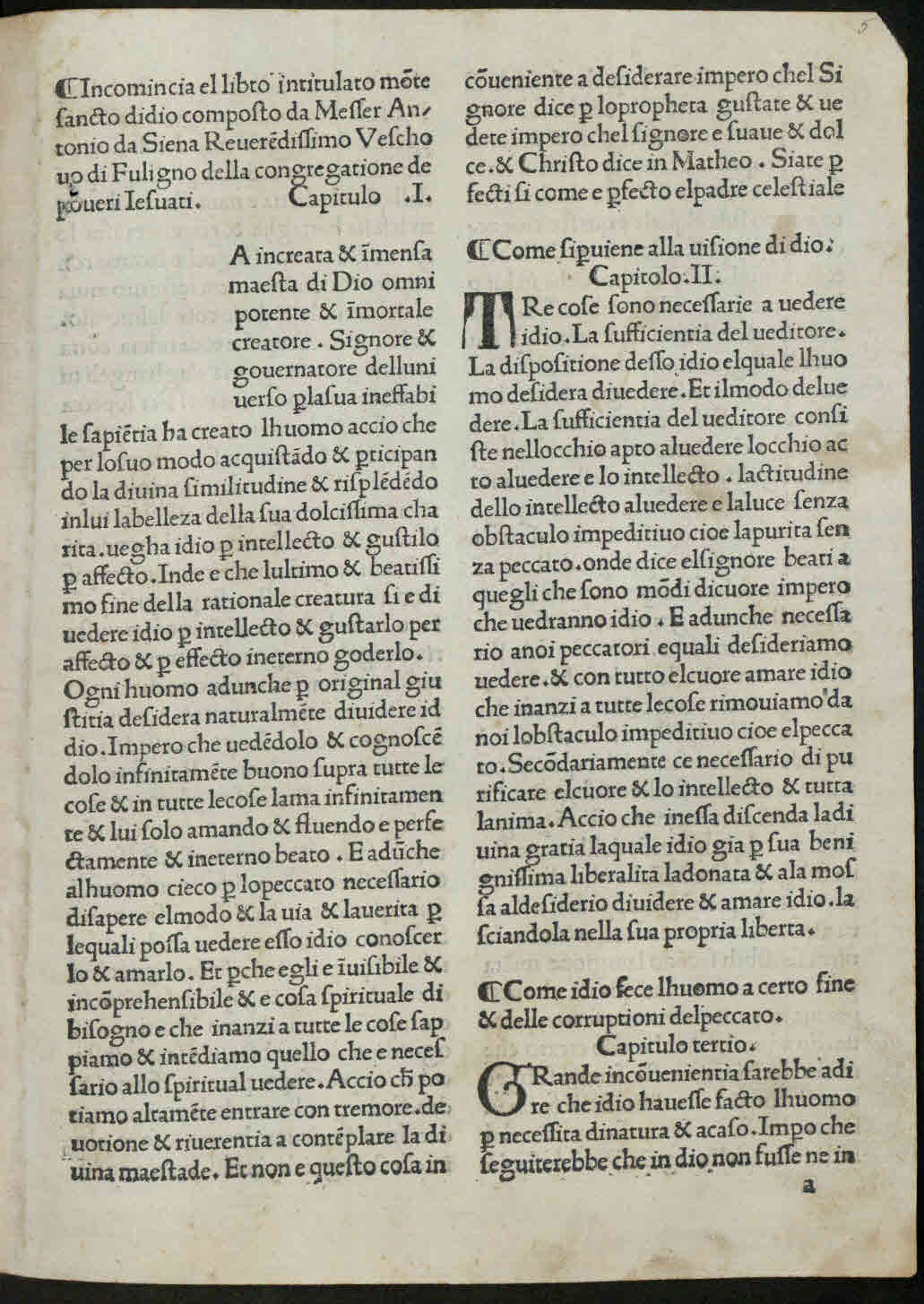 Monte santo di Dio. - Impresso nella inclita cipta di Firenze : con somma diligentia per ser Lorenzo de Morgiano & Giovanni thodesco da Maganza, Adi XX di marzo MCCCCXCI. - 92 c. ; [*]⁴, a⁸, b⁶, c⁸, d⁶, e⁸, f⁶, g⁸, h⁶, i⁸, k⁶, l⁸, m⁶, n⁴ ; fol. .